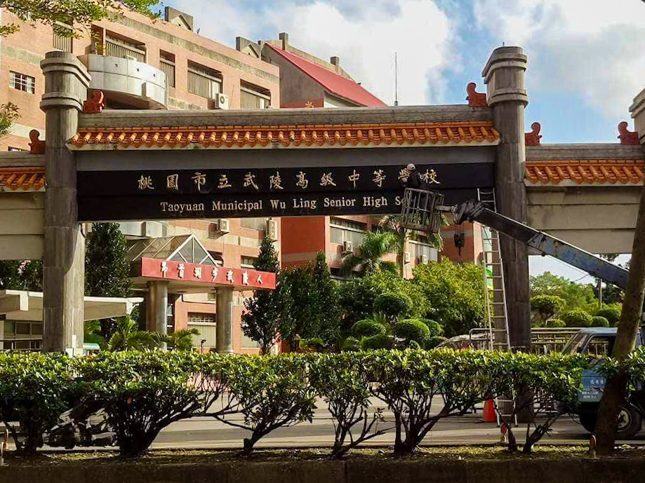 這是2017年12月31日中午拍到，工人置換武陵高中校門口標語的照片。原本「國立武陵高中」在12月29日(國立時代最後一次上課日)時以提寫新銜的紅布條代替以配合改隸佈達典禮，12月30日石刻新銜才被安裝上。